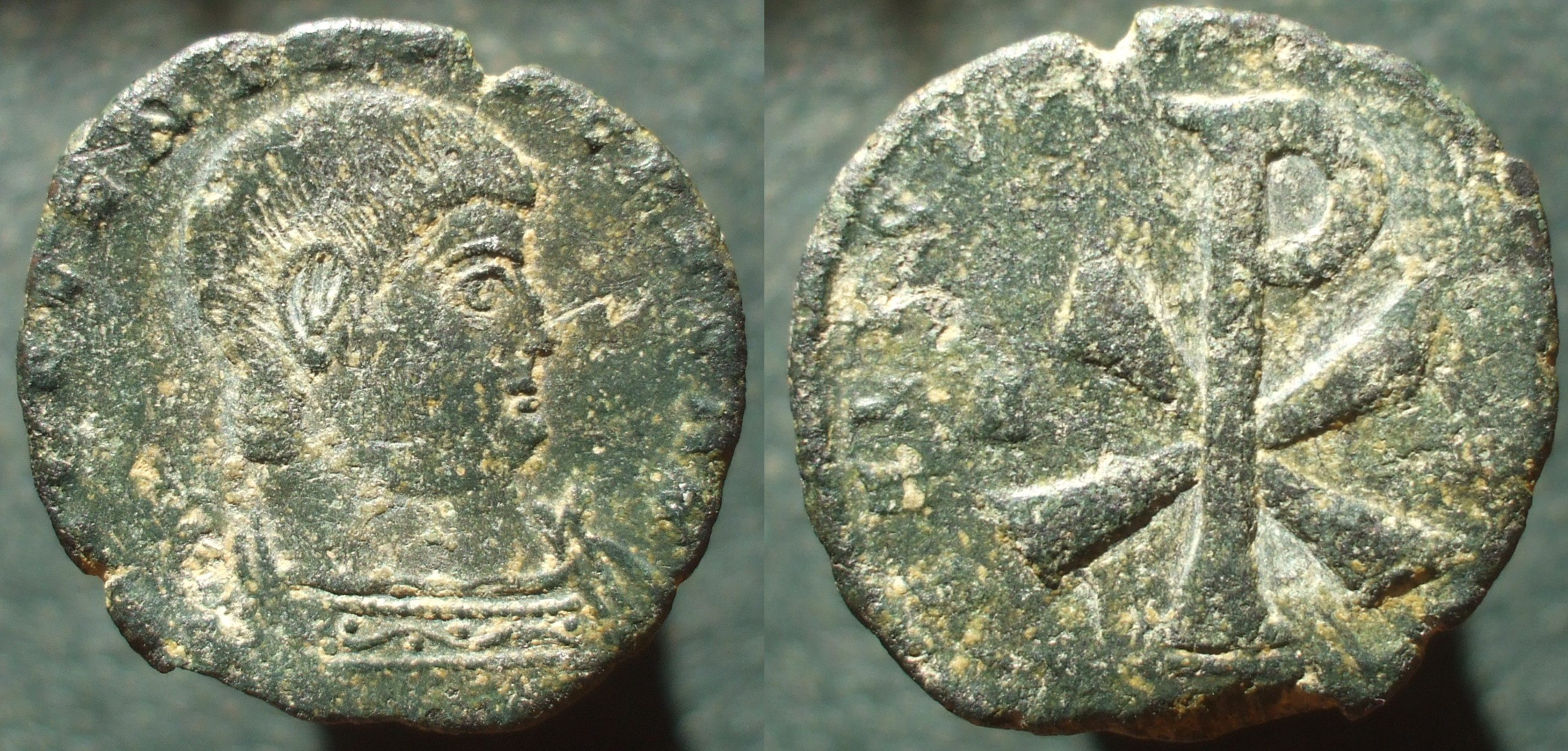 Decence chrisme majorina maiorina